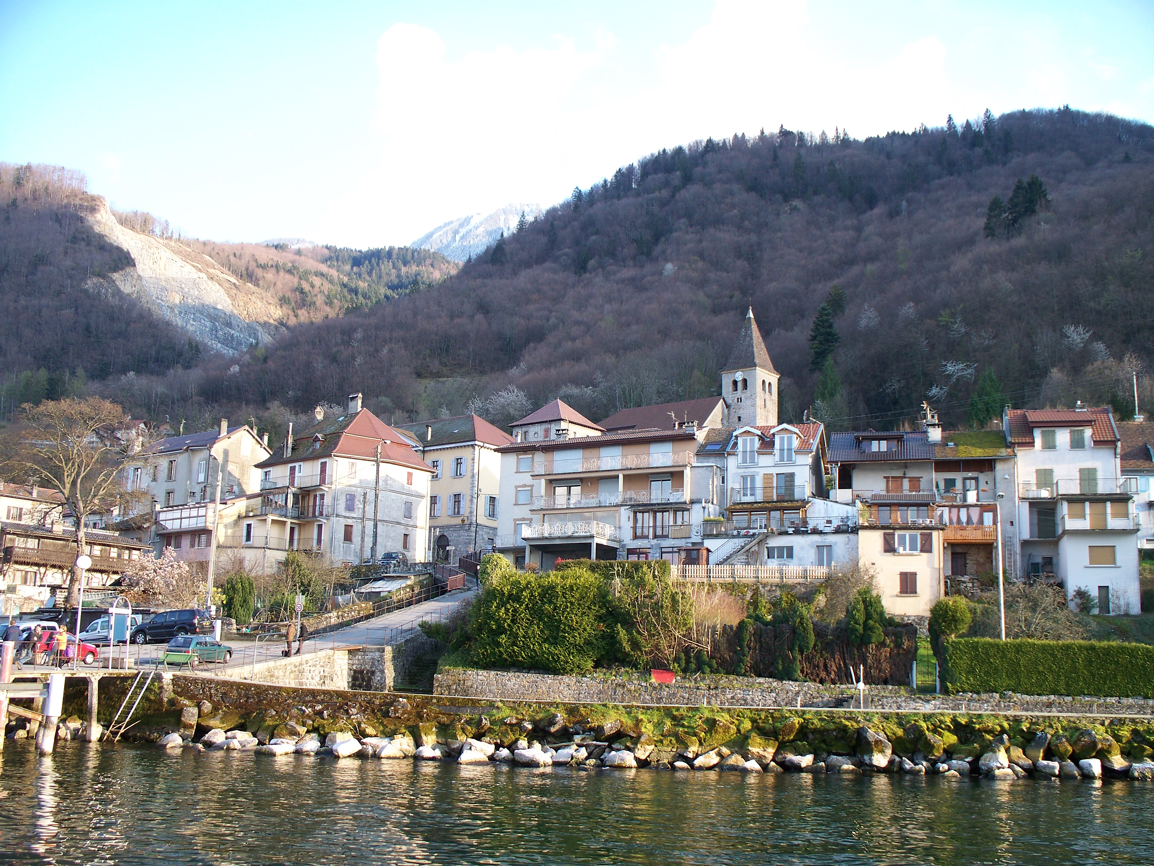 Le village de Meillerie vu du lac Léman